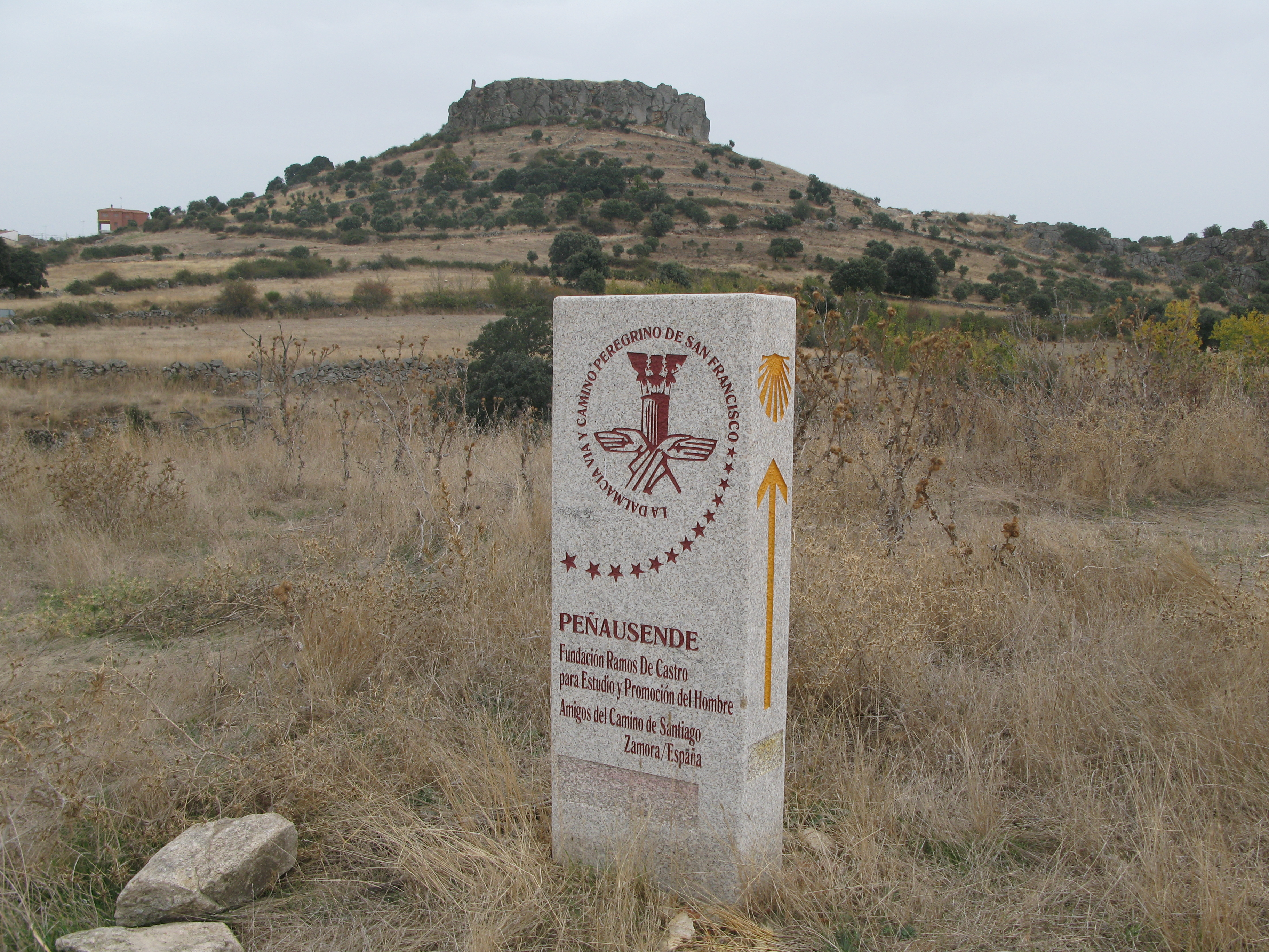 Monolito del Camino de Santiago en Peñausende, Zamora